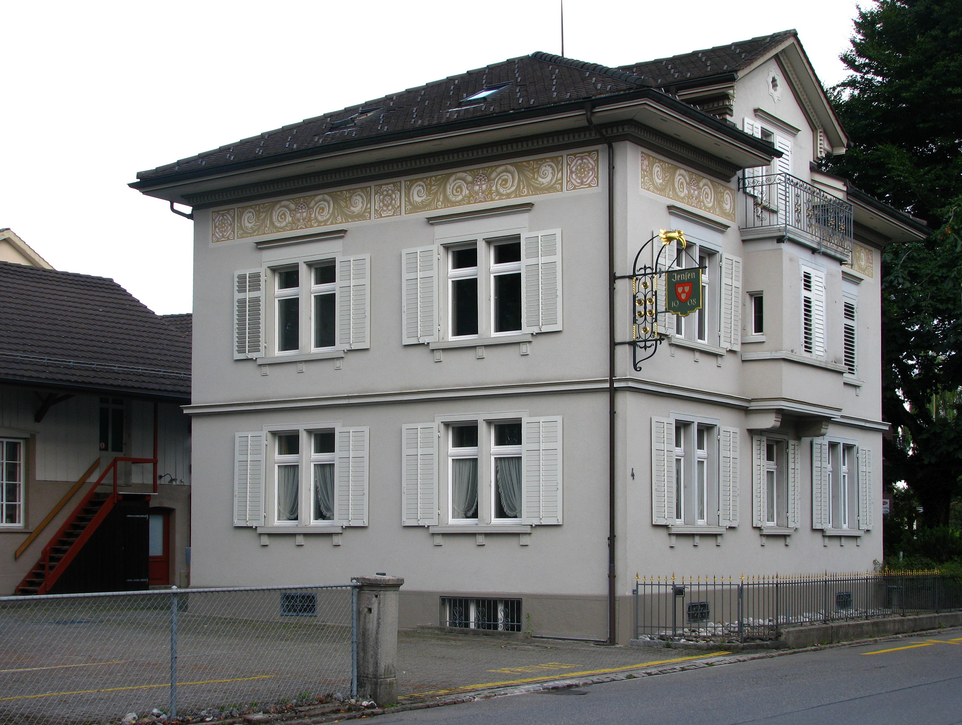 Wetzikon-Kempten (Switzerland) Malermuseum